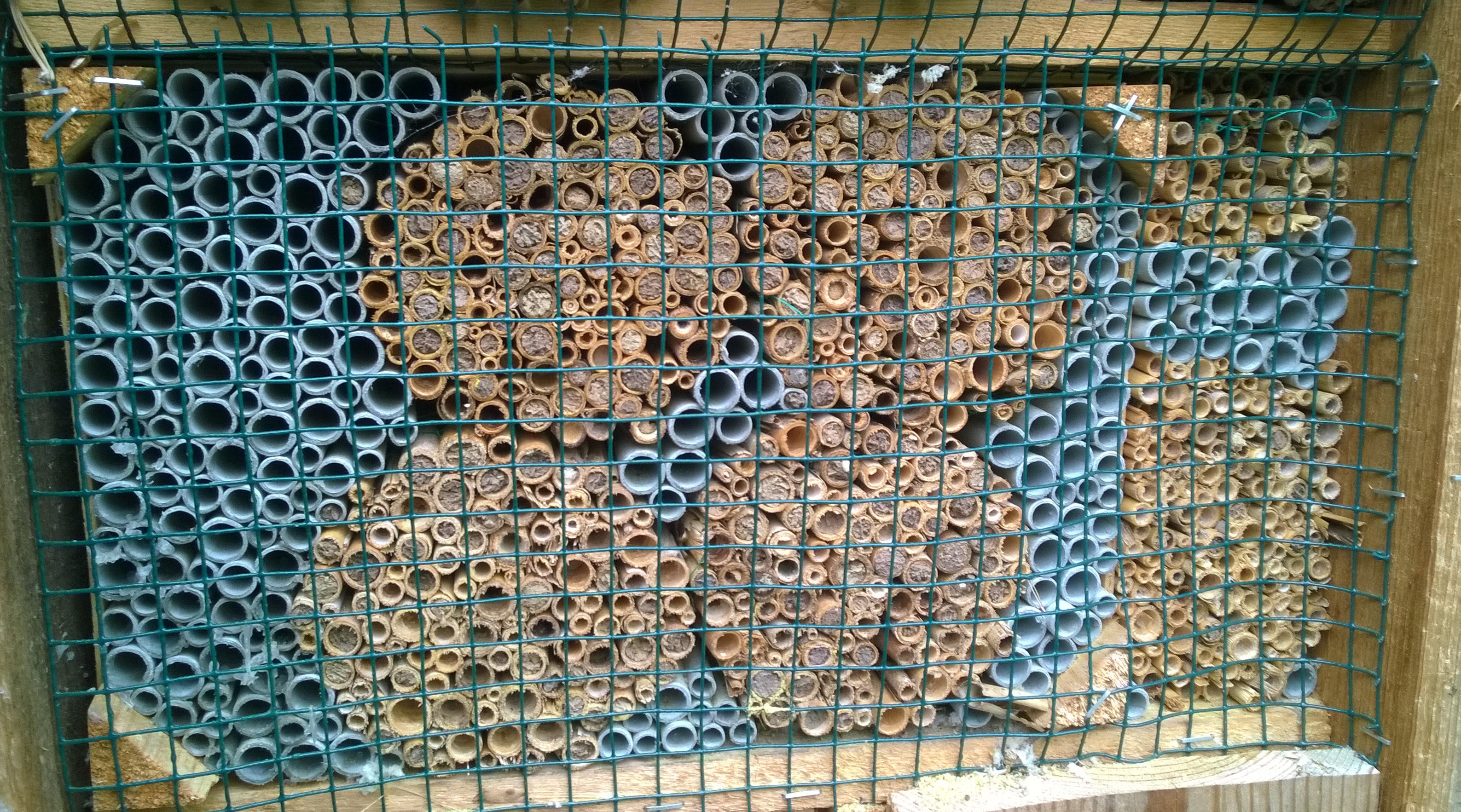 Nisthilfen Eigenbau Schilf und Pappröhrchen in einer alten Mandantenkreise und mit Kleintierdraht gesichert